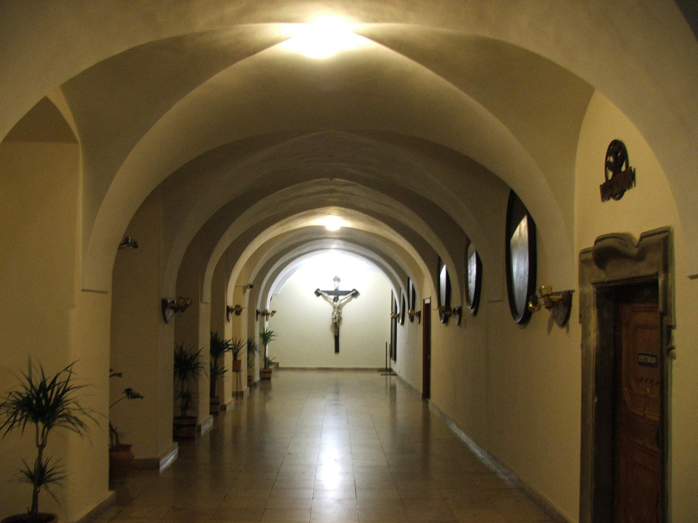 Az esztergomi Franka folyosója